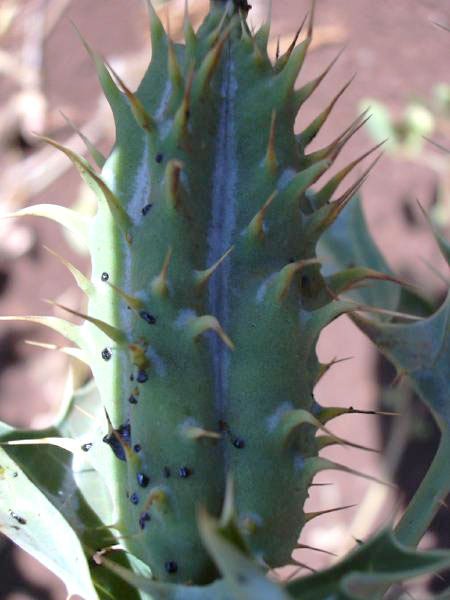 Mexican Poppy (Argemone mexicana)fruit.